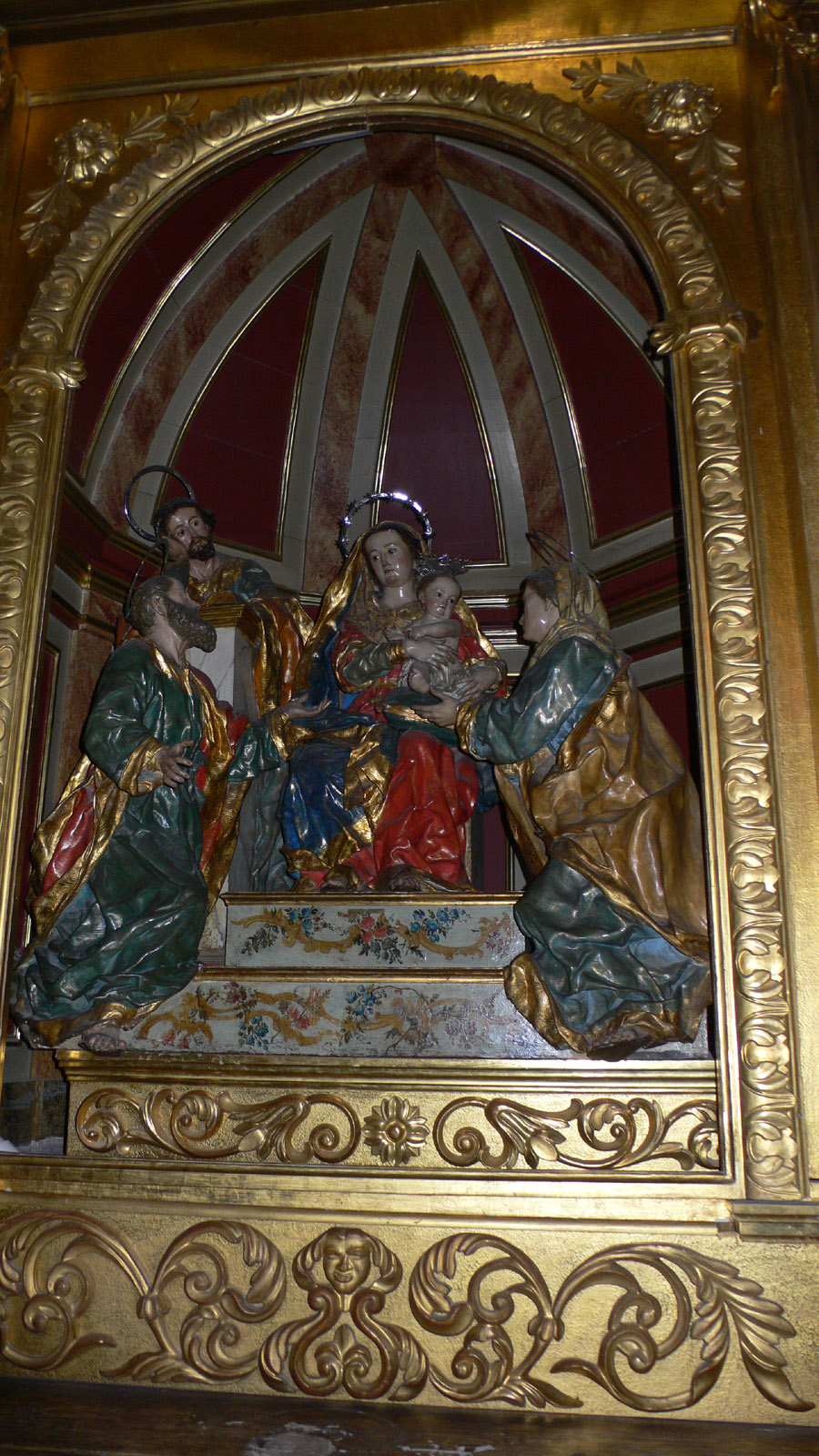 Sagrada Familia. Obra realizada hacia 1735 por el escultor murciano Francisco Salzillo. Iglesia de San Miguel de Murcia